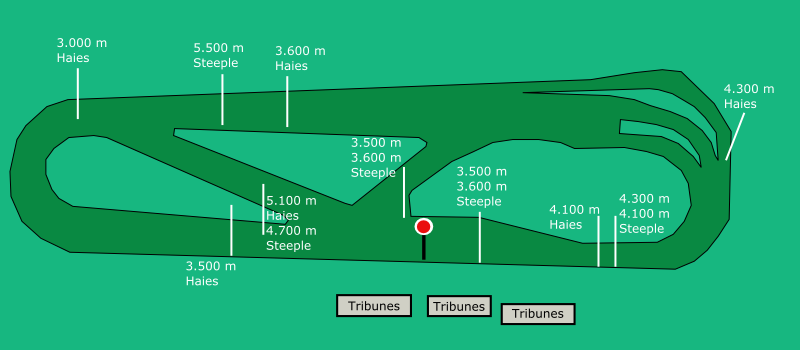 Les pistes de l'hippodrome d'Auteuil (Paris, France) historicair 22:08, 24 February 2006 (UTC)